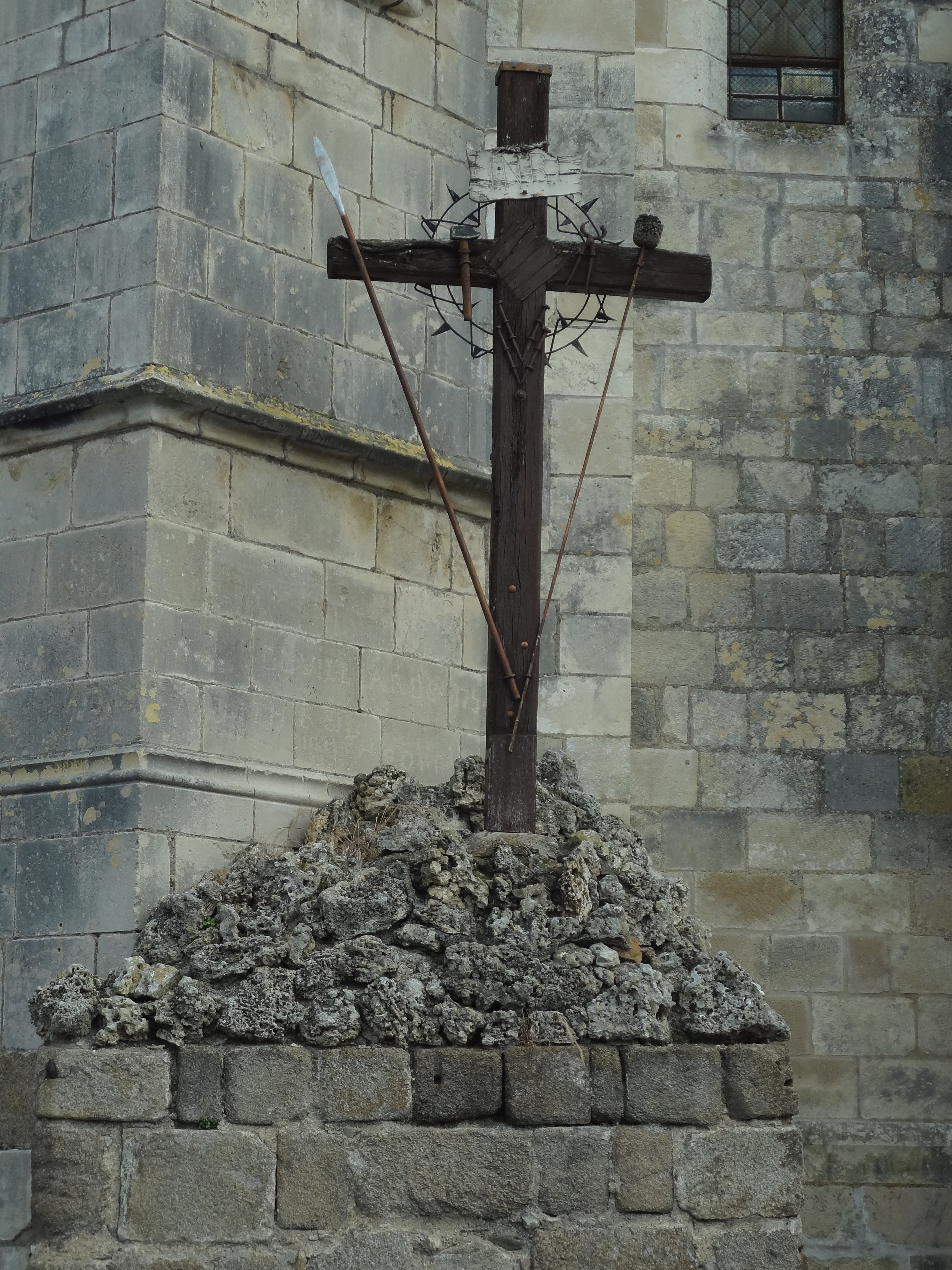 Calvaire d'Adriers, avec les instruments de la Passion